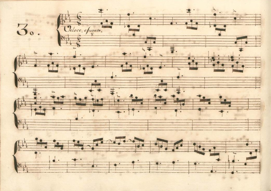 La sonate K. 387, telle qu'elle se présente dans le manuscrit de Parme, volume X no. 30.